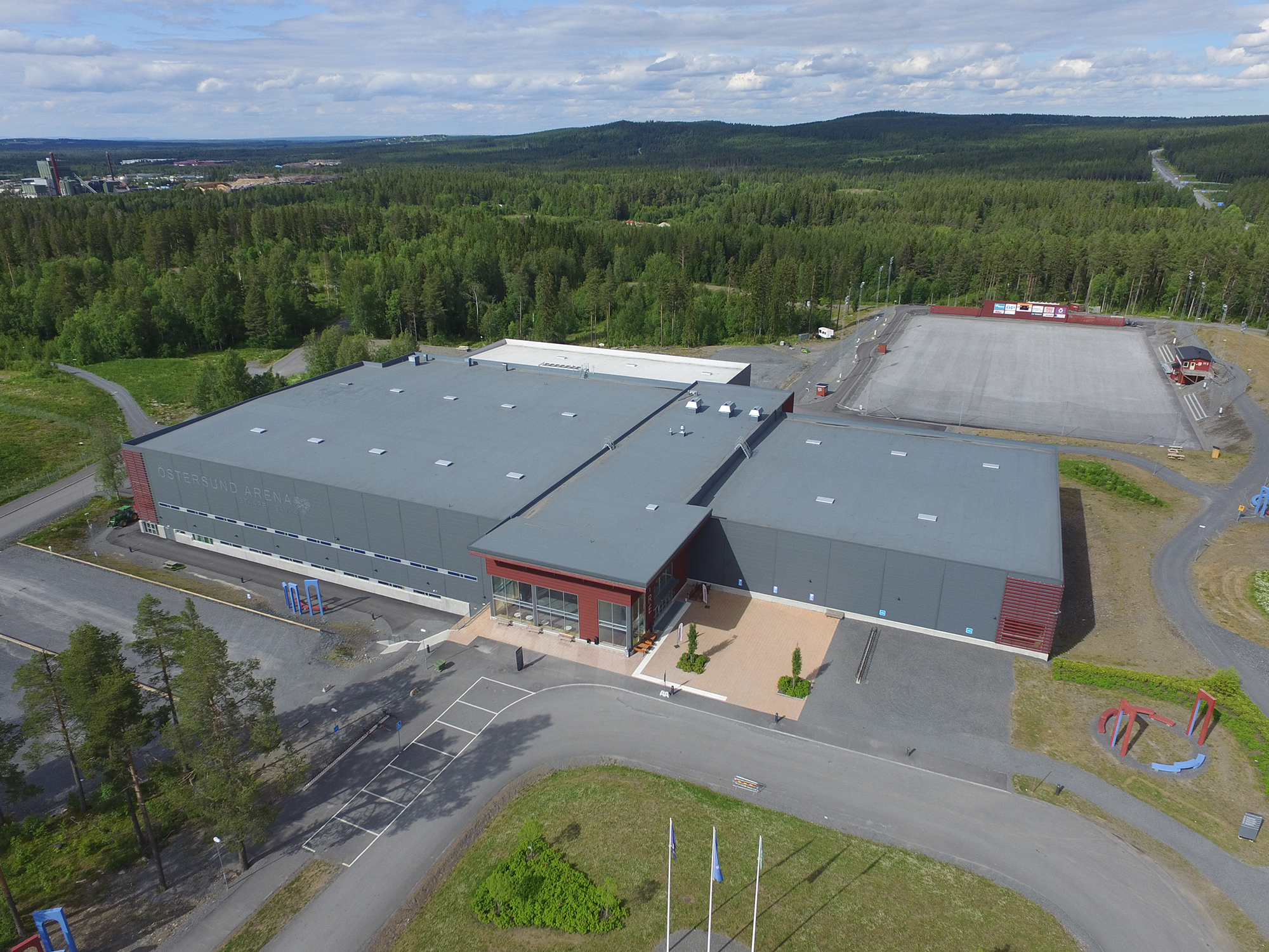 Östersund Arena Sommaren 2017